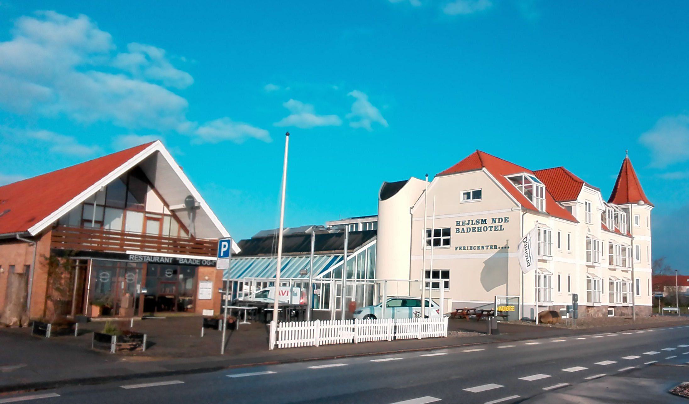 Hejlsminde Badehotel